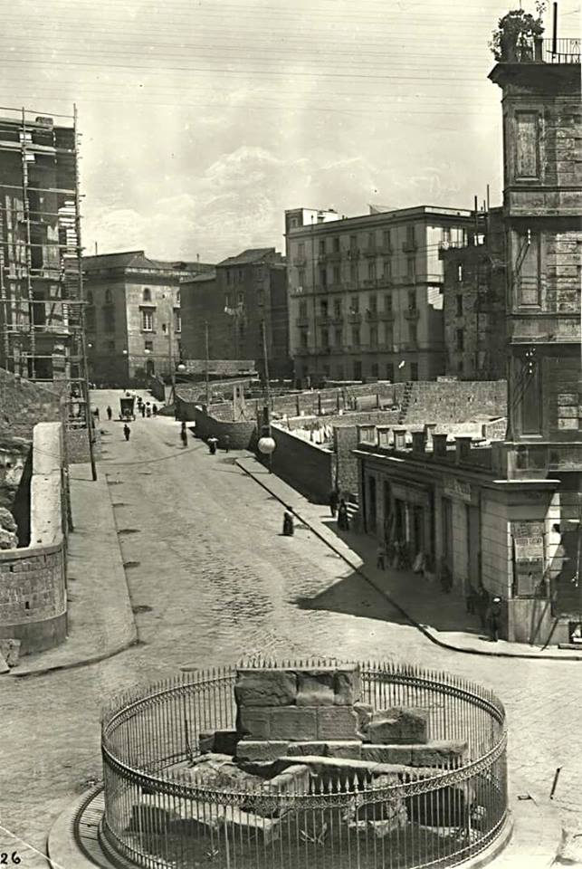 Napoli - Piazza Calenda con le mura greche, all'epoca dei lavori del Risanamento.